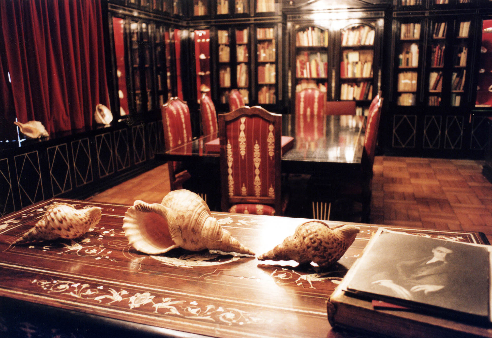 BIBLIOTECA PABLO NERUDA, Colección Caracolas CASA CENTRAL DE LA U. DE CHILE, Archivo Central Andrés Bello DICIEMBRE-2000